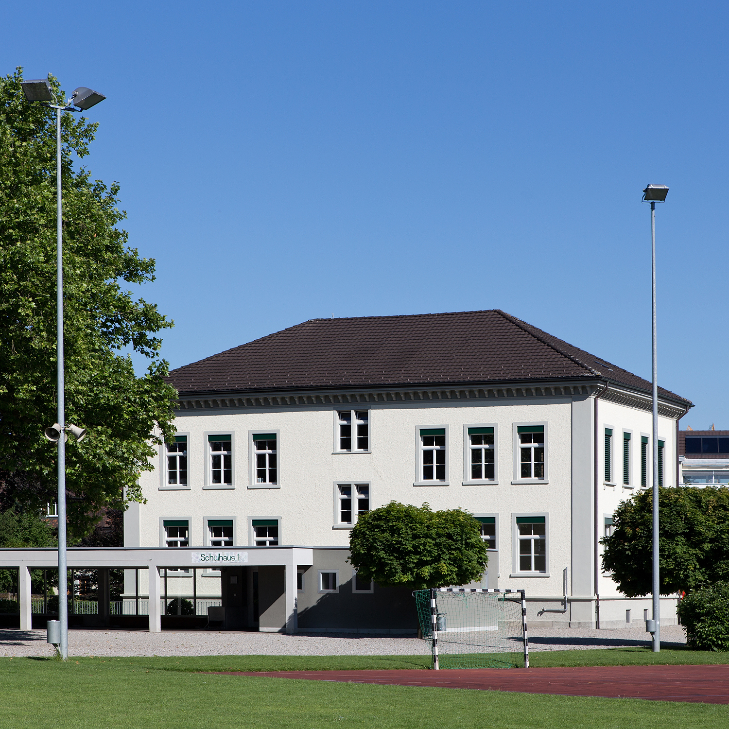 Schulhaus 1 des Schulzentrums Oberhofen in Münchwilen TG